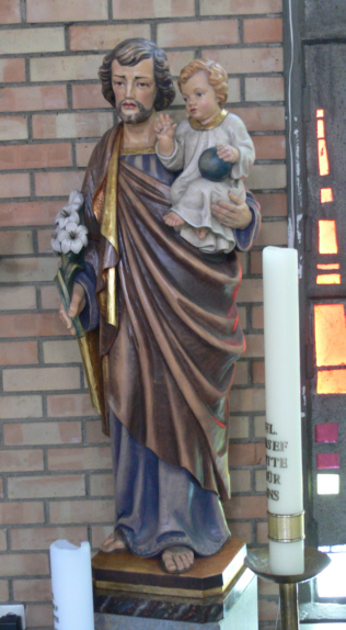 Katholische Pfarrkirche St. Felix und Regula, Zogenweiler, Gemeinde Horgenzell, Landkreis Ravensburg Figur "Hl. Joseph"